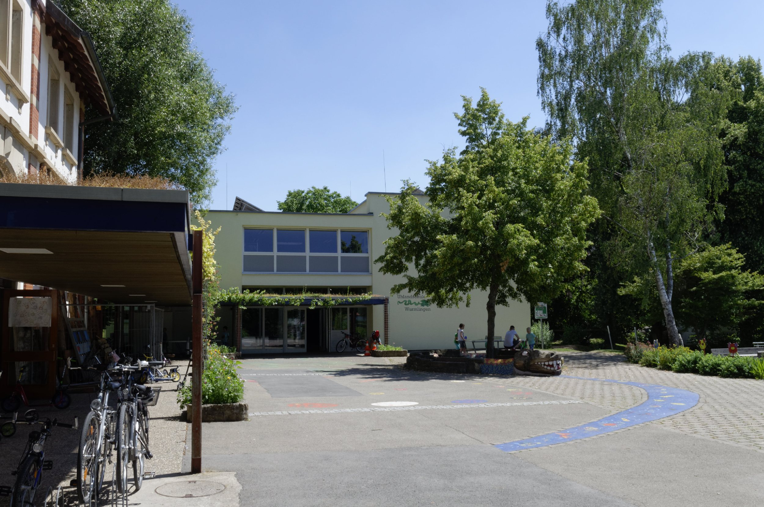 Bilder aus Wurmlingen 2016